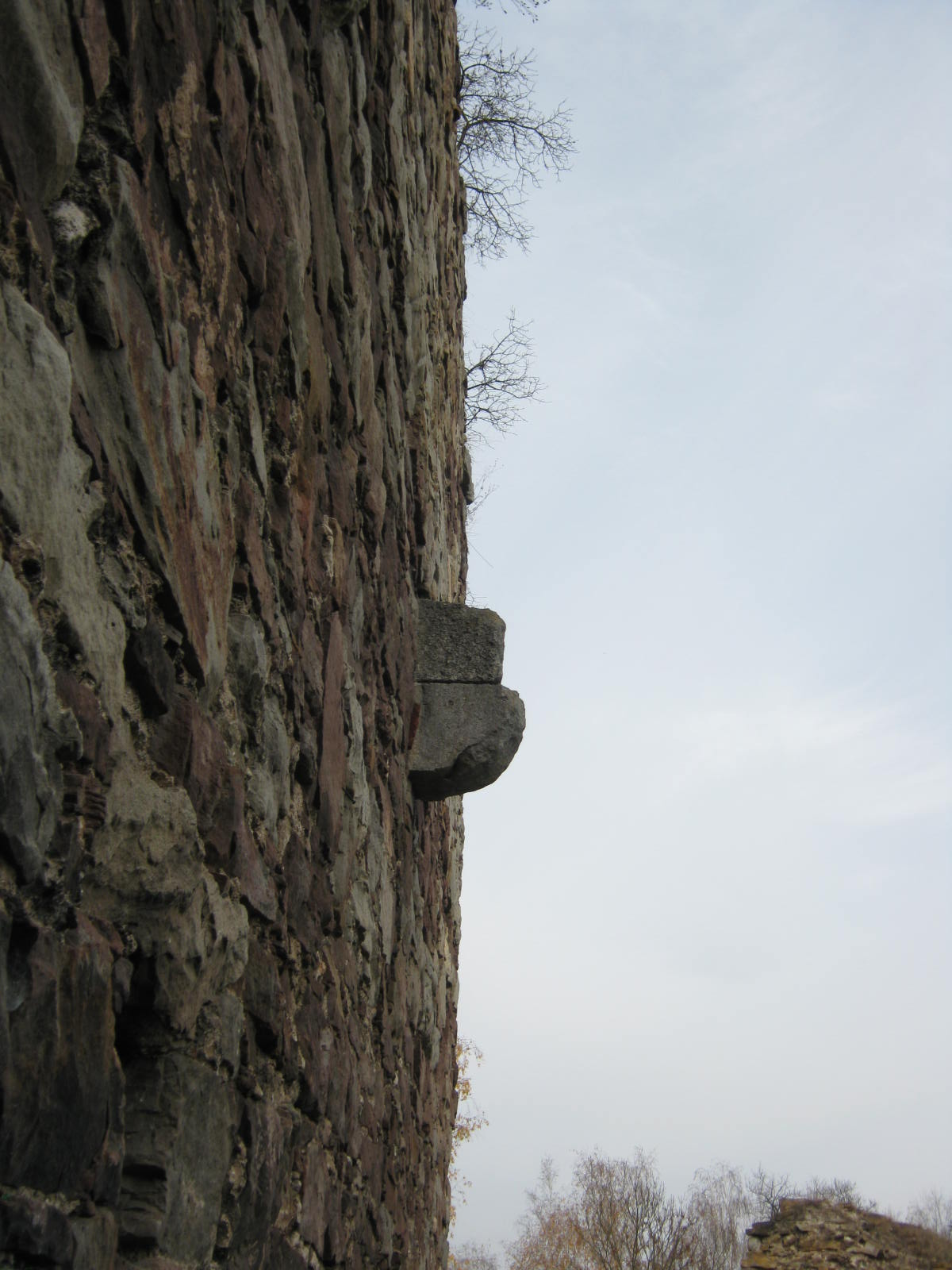 Залишки опор. Фортеця. Бучач